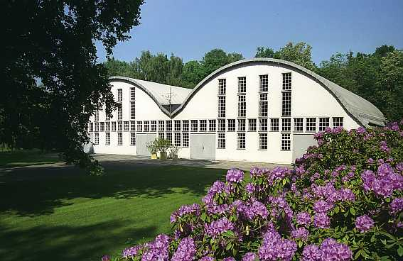 Johannische Kirche Blankensee; Kirche der Friedensstadt